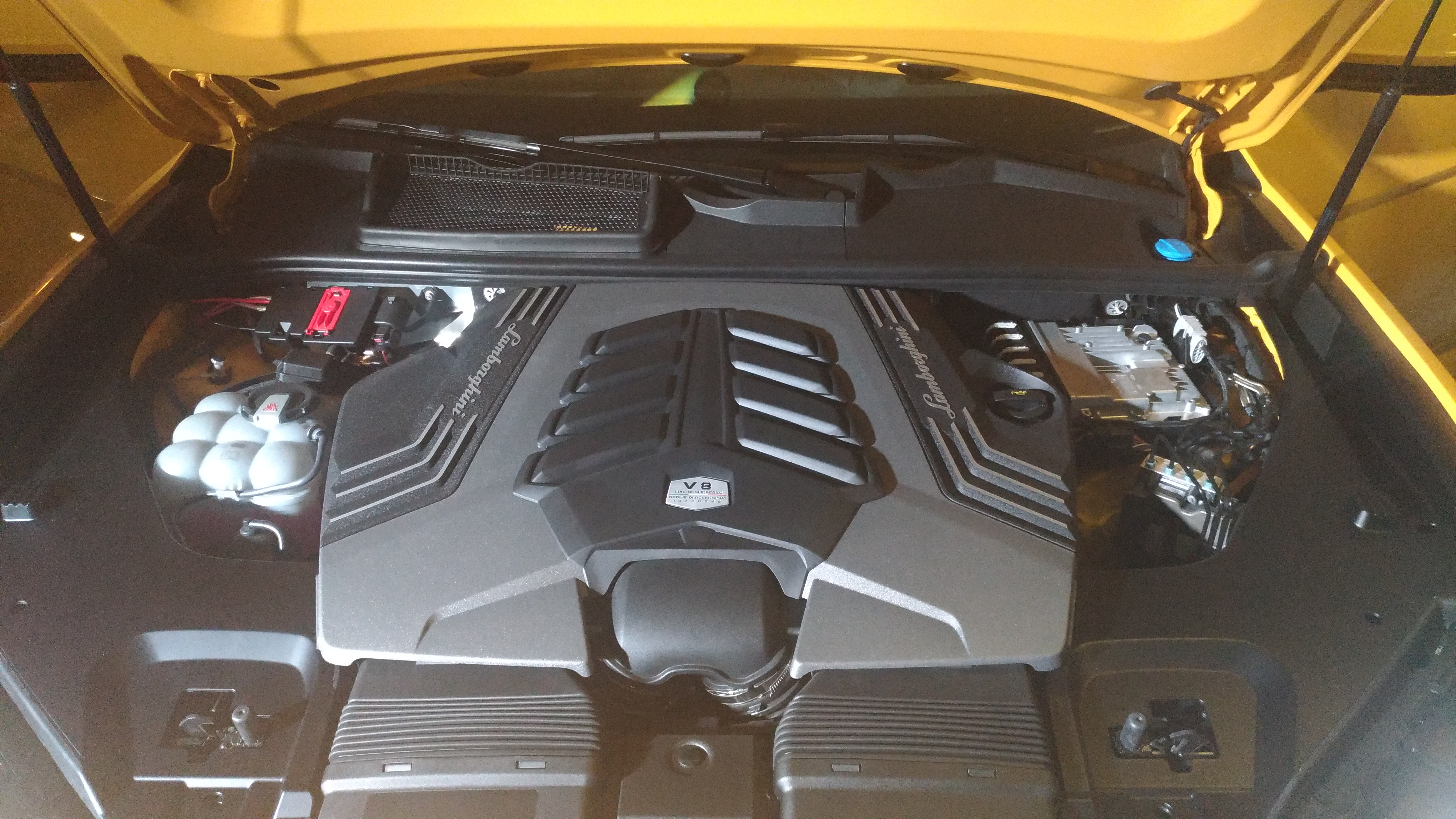 Lamborghini Urus soirée inaugurale concession Lamborghini Paris